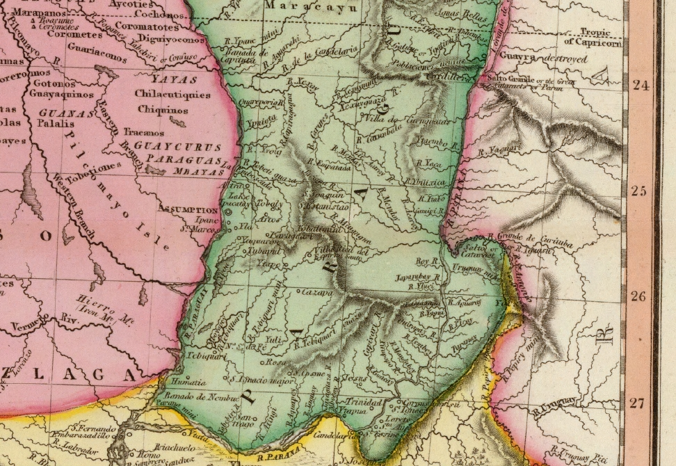 Paraguay. Detalle de un mapa de las Provincias Unidas en 1812